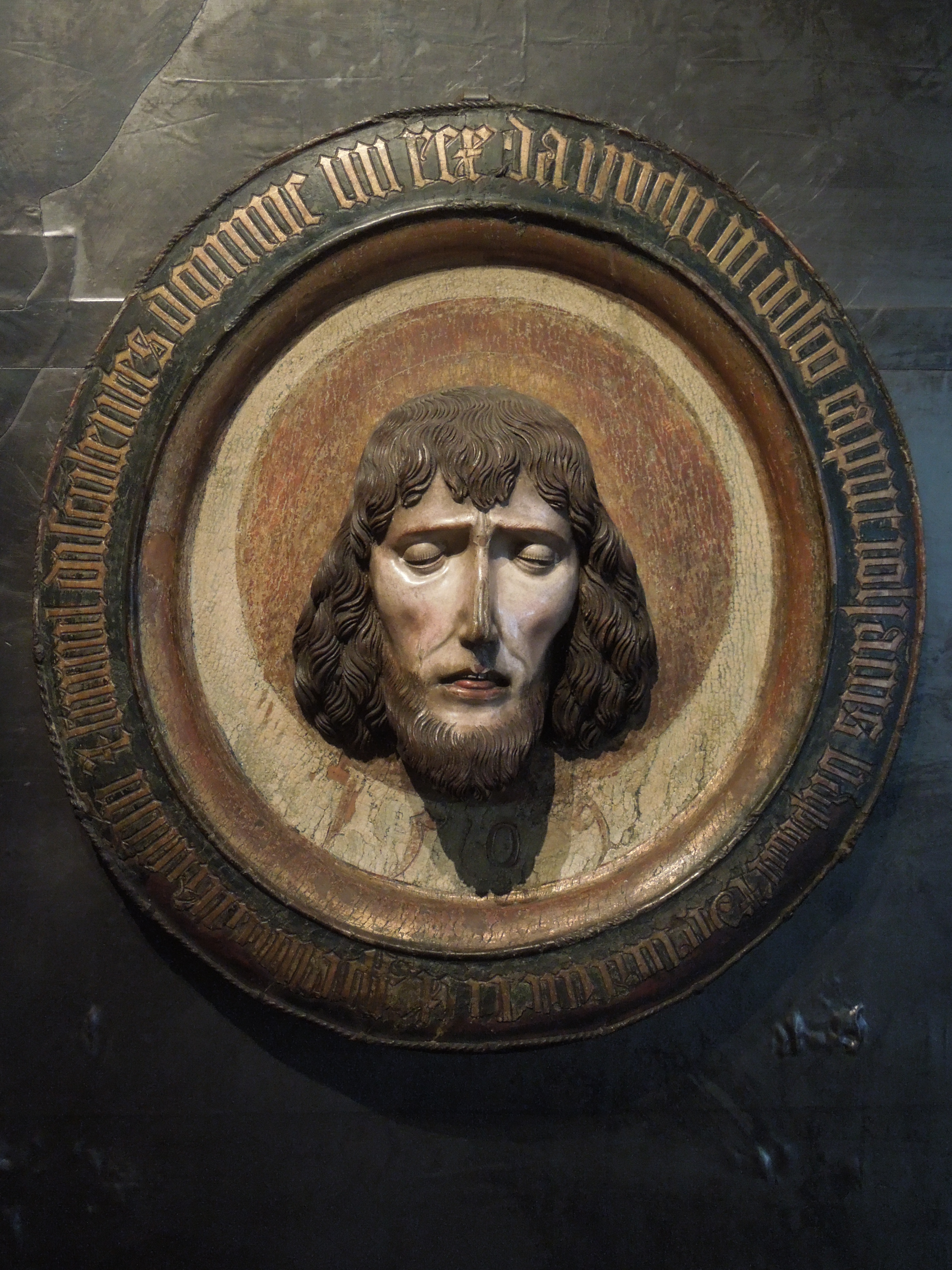 Pancratius Grueber - Bowl with the Head of St John the Baptist, Saxony, 1509